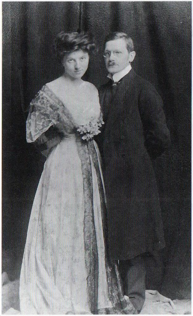 Wilhelm Freiherr von Tettau mit Ada Nievo